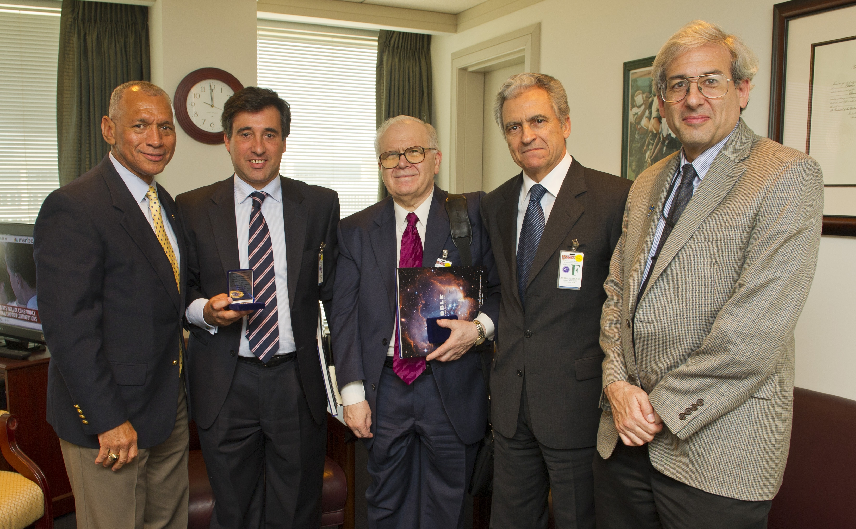 El embajador argentino en Estados Unidos, Alfredo Chiaradía, y el Director Ejecutivo de la CONAE, Conrado Varotto, fueron recibidos ayer en la sede central de la NASA por las autoridades de la agencia espacial de los Estados Unidos, antes del lanzamiento del satélite argentino SAC-D. De izquierda a derecha: Michael Freilich, Director de la División Ciencia de la Tierra (Earth Science Division); Ministro Roberto Diez (de la embajada argentina); Director Ejecutivo CONAE Conrado Varotto, Embajador argentino en EEUU, Alfredo Chiaradia y Administrador General de la NASA, Charles Bolden